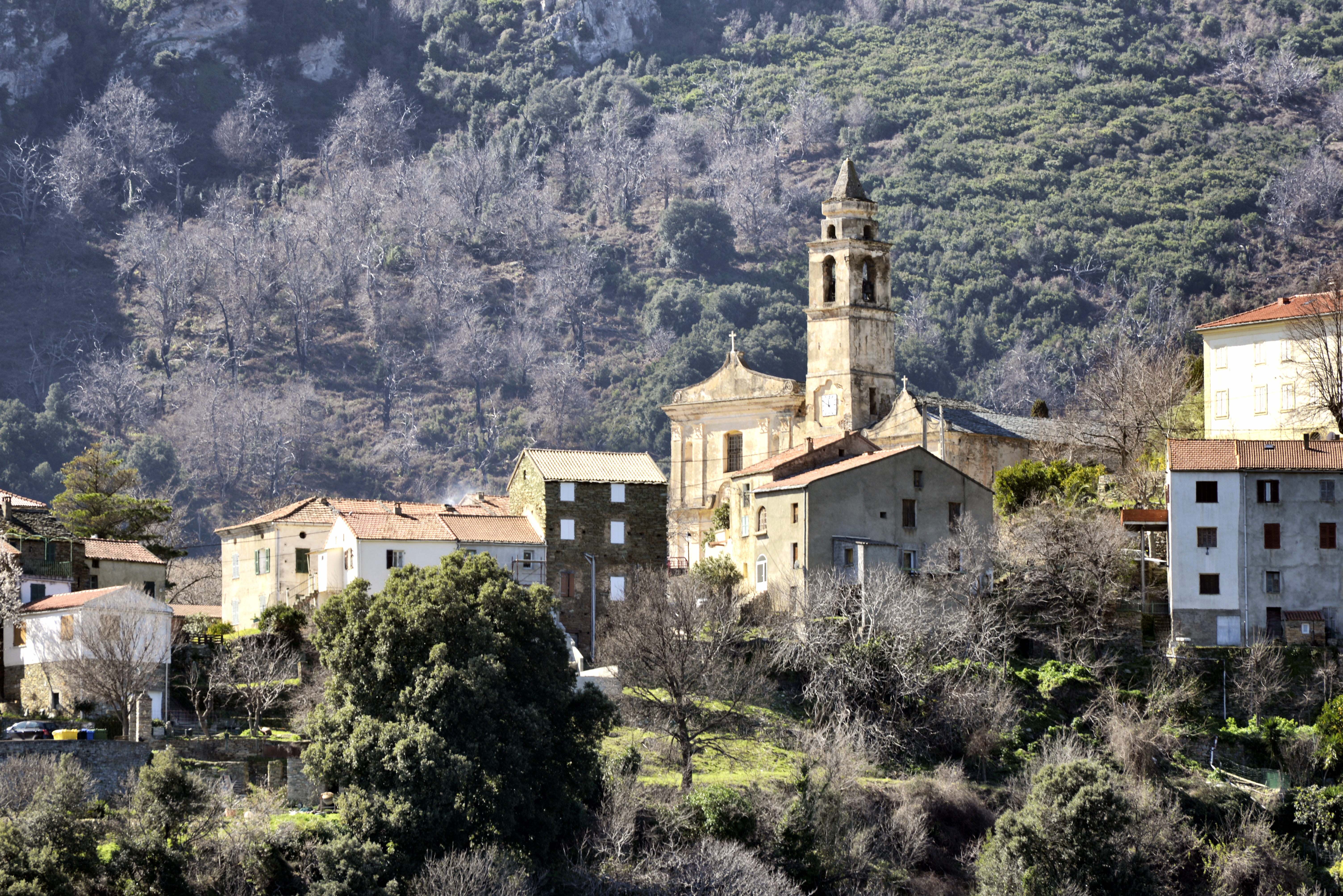 Santo-Pietro-di-Tenda, Nebbio (Corse) - Le centre du village dominé par le remarquable ensemble église Saint-Jean et chapelle des Pénitents de la Sainte-Croix. Il est restauré depuis la prise de la photo. .